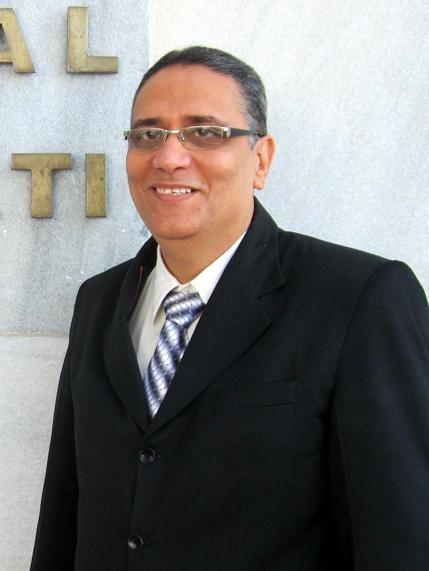 Científico cubano